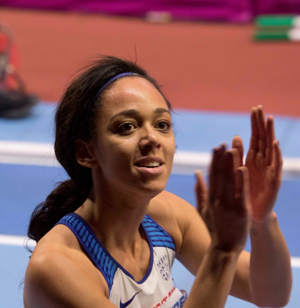 WK2B0124 katarina jt